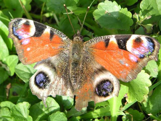 Inachis io